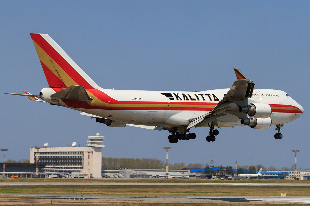 Kalitta Air Boeing 747-400 landing at Vladivostok Airport